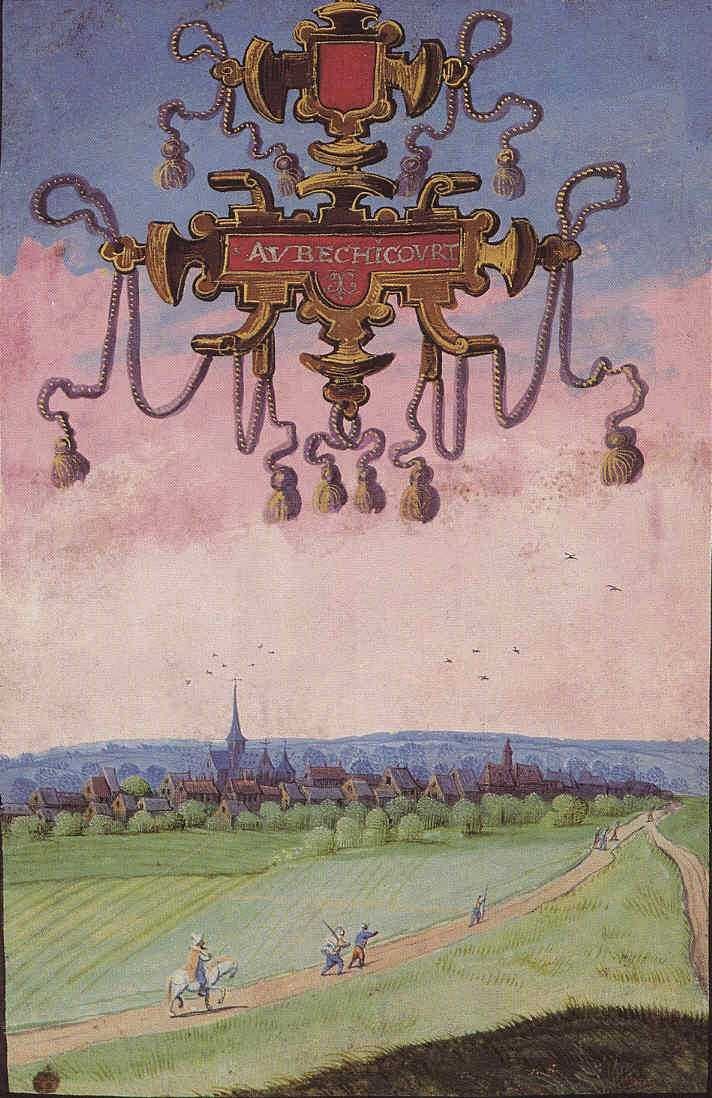 Description d'Auberchicourt; cartulaire de Croy (Albums de Croÿ), Village vu du sud-est, avec route venant de Bouchain et jonction (à droite) vers chemin de Denain. Les maisons sont densément groupées autour de l'église construite en pierre et couverte d'ardoises; Près de l'église, l'artiste a figuré une tour construite des mêmes matériaux, carrée et couverte d'une courte flèche : il s'agit probablement d'une partie du château (cité à partir du XIIe siècle, ayant appartenu aux grandes familles importantes (Lallaing, Lannoy, Sainte-Aldegonde de Noircarmes).. Les 2 bâtiments à couverture de tuiles pourraient en être une dépendance. Le bâtiment couvert de tuiles orné d'une cheminée, pourrait être le four du village. Les 2 grandes constructions unies par une haute tourelle (les 3 étant couvertes de tuiles) pourraient peut-être figurer la maison des échevins et la halle. L'industrialisation et les guerres changeront complètement le paysage régional. L'église une première fois reconstruite après 1647 le sera encore en 1874.